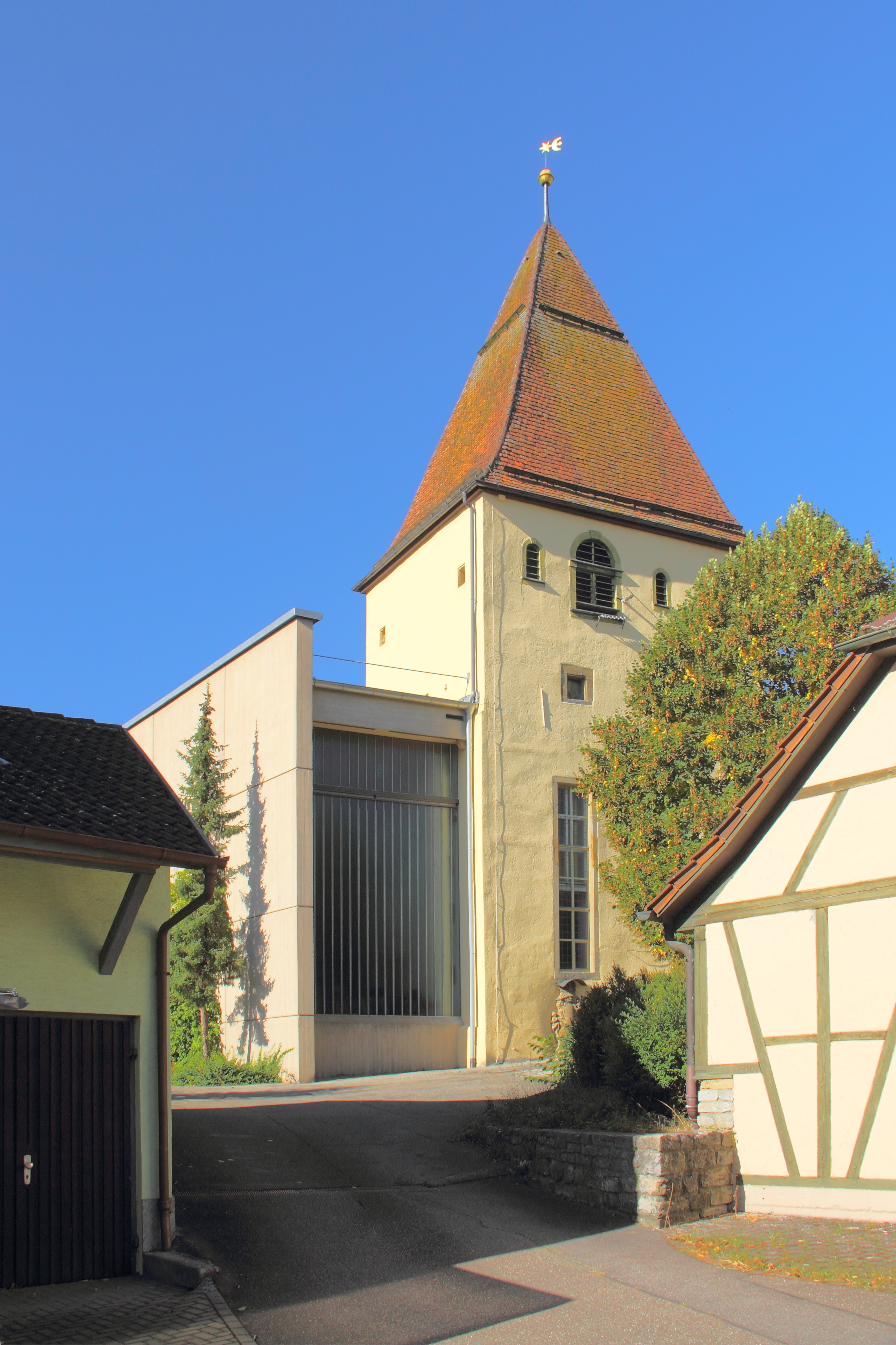 Die evangelische Pfarrkirche des Niederstettener Ortsteils Vorbachzimmern steht gem. §28 DSchG unter Denkmalschutz. Der alte frühgotische Turm ist in einen Neubau aus dem Jahr 1967 integriert. Auch im Innern ist der alte Turm deutlich vom modernen Inneren abgegrenzt.